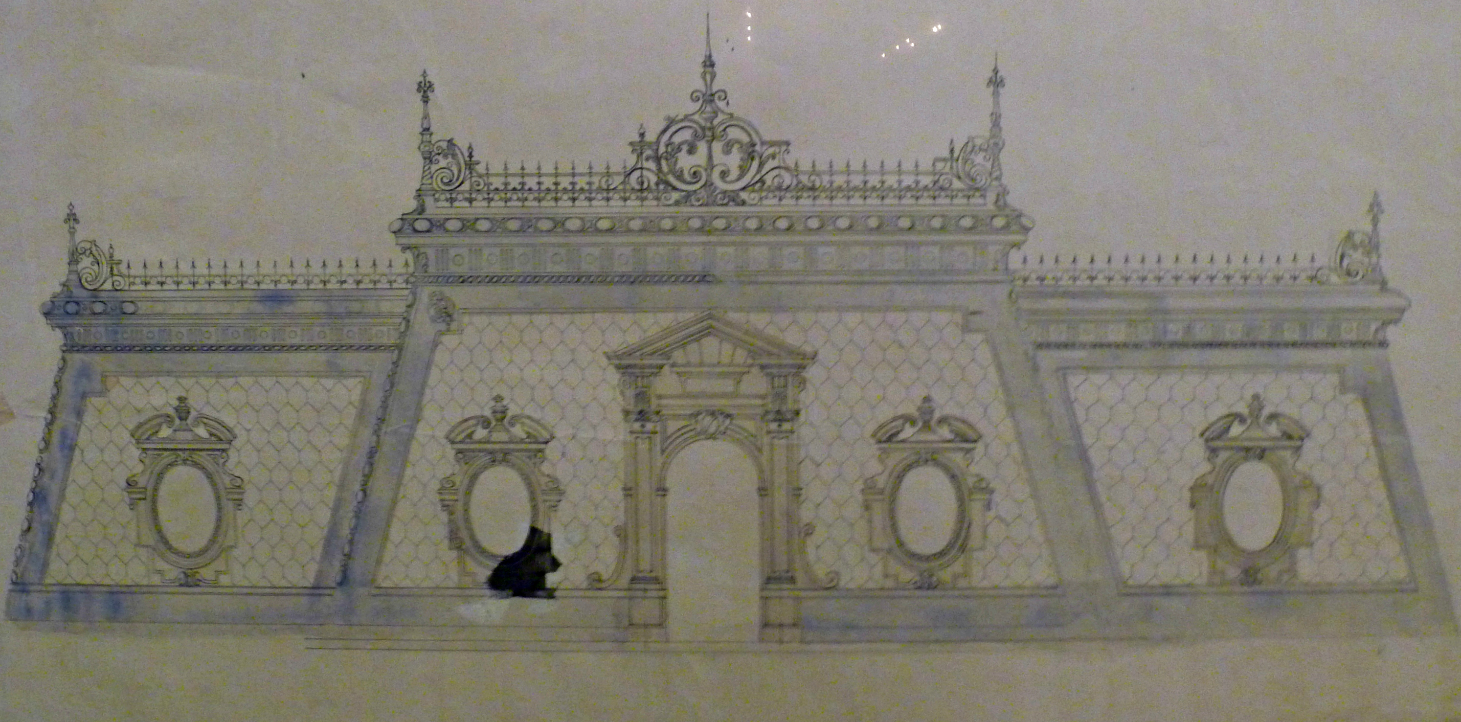 Dibujo del techo del Palacio de Najas, parte de la concepción del proyecto diseñado por el arquitecto Francisco Durini Cáceres para Constantino Najas, casado con la francesa Susane de Lavelle, en cuyo honor el arquitecto llamaba a este proyecto "Villa Susana". Tinta sobre papel, Francisco Durini Cáceres (1923).